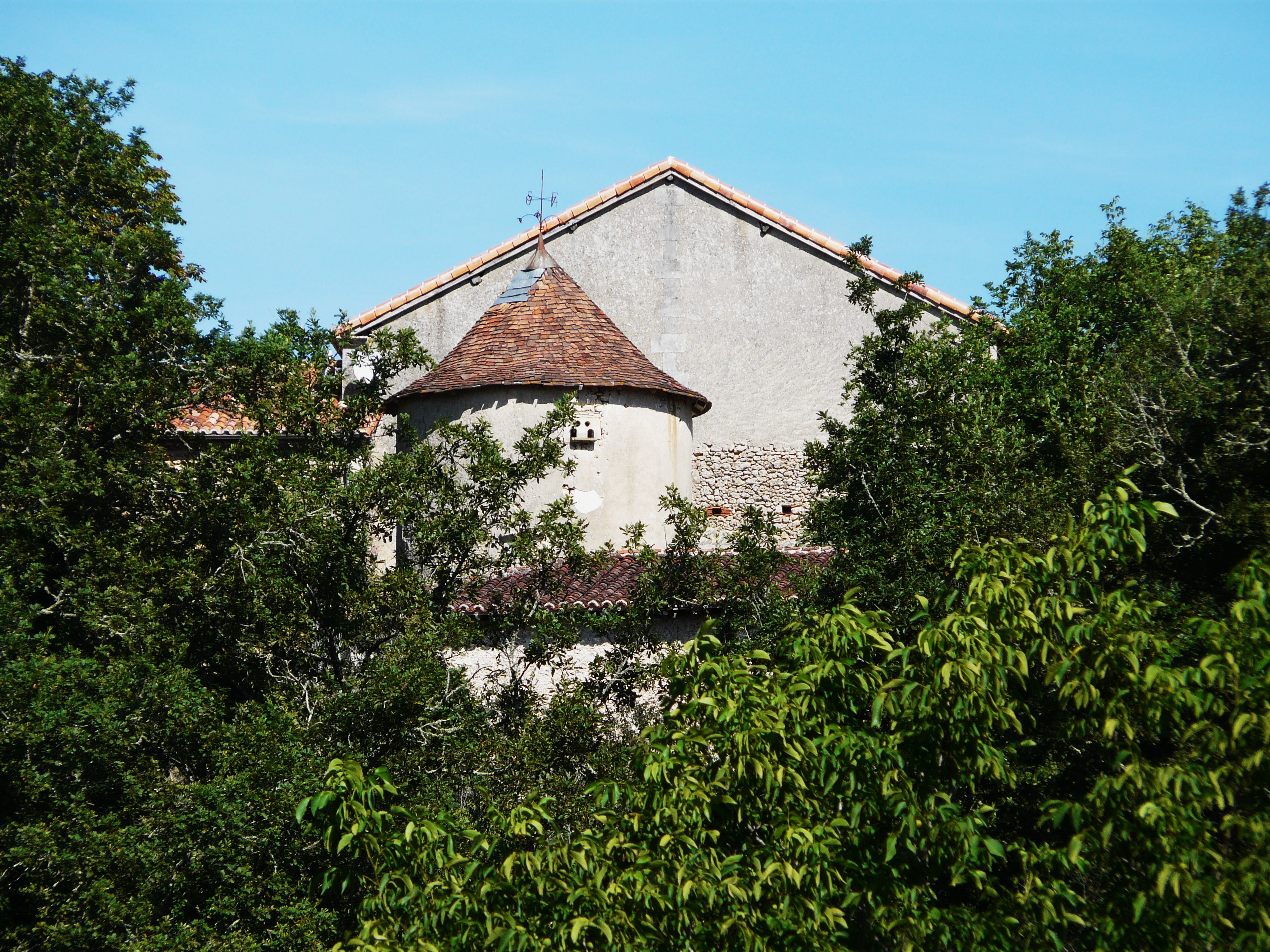 Le pigeonnier du château de la Valade vu du sud, Bourdeilles, Dordogne, France